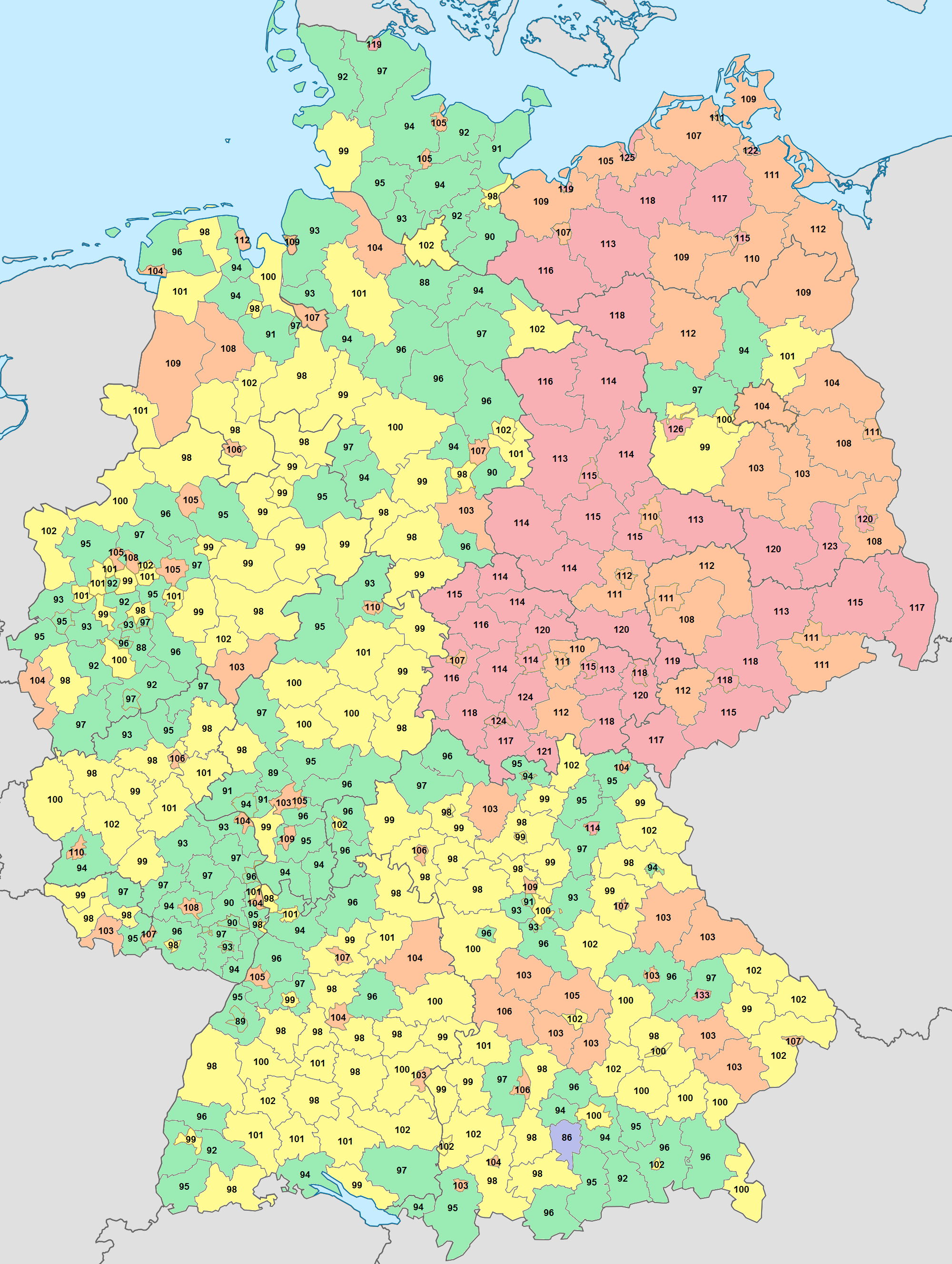 Die Karte zeigt die Geschlechterverteilung in Deutschland auf Ebene der Landkreise für die Altersklasse der 30- bis 39-Jährigen (heutige Elterngeneration). Die Werte geben an, wieviele Männer auf jeweils 100 Frauen diesen Alters im Landkreis entfallen. Rot sind Werte über 112,5 Männern pro 100 Frauen, orange zwischen 102,5 und 112,5, gelb zwischen 97,5 und 102,5, grün zwischen 87,5 und 97,5 und blau unter 87,5 Männer pro 100 Frauen. Die Daten beziehen sich auf den Zensus 2011; der Durchschnittswert dieser Altersklasse für Deutschland lag bei 100,8 Männern pro 100 Frauen.